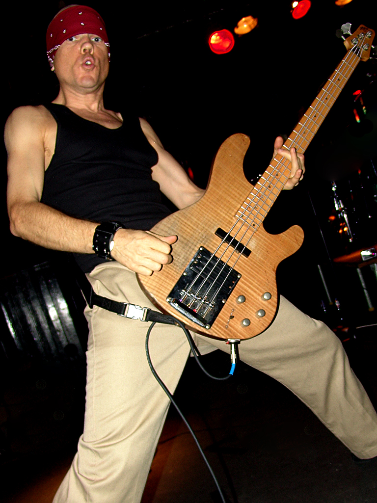 Mawk von (hed)p.e.